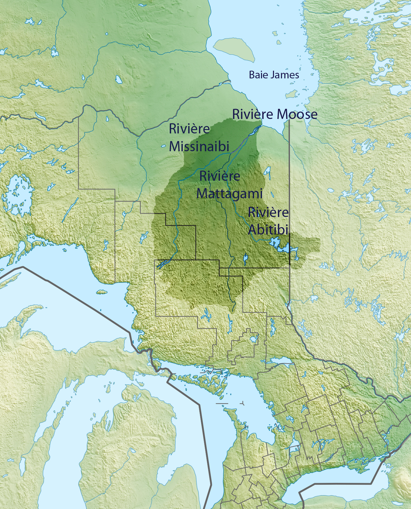 Carte du bassin versant de la Moose